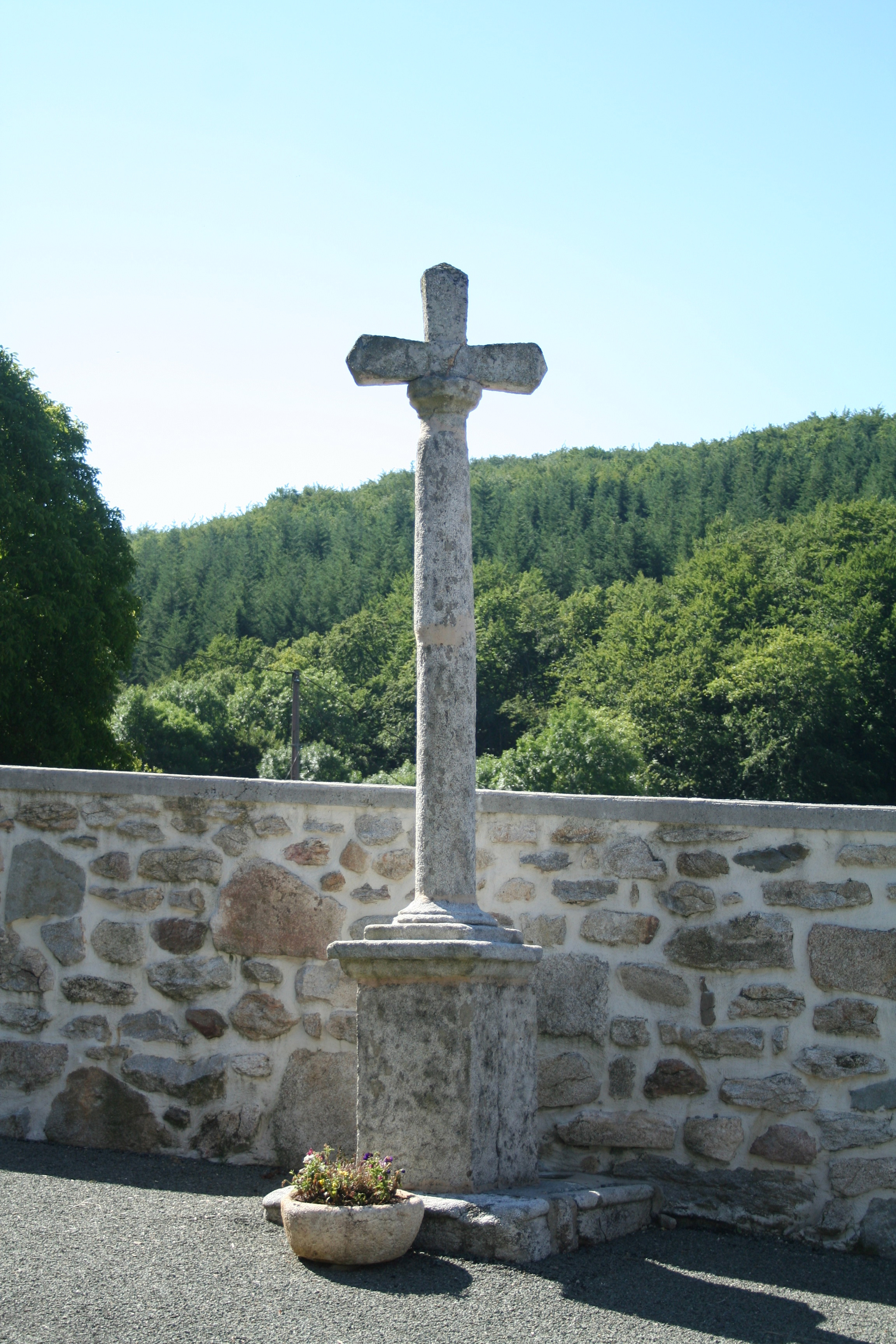 Le Margnès (Tarn) - croix.